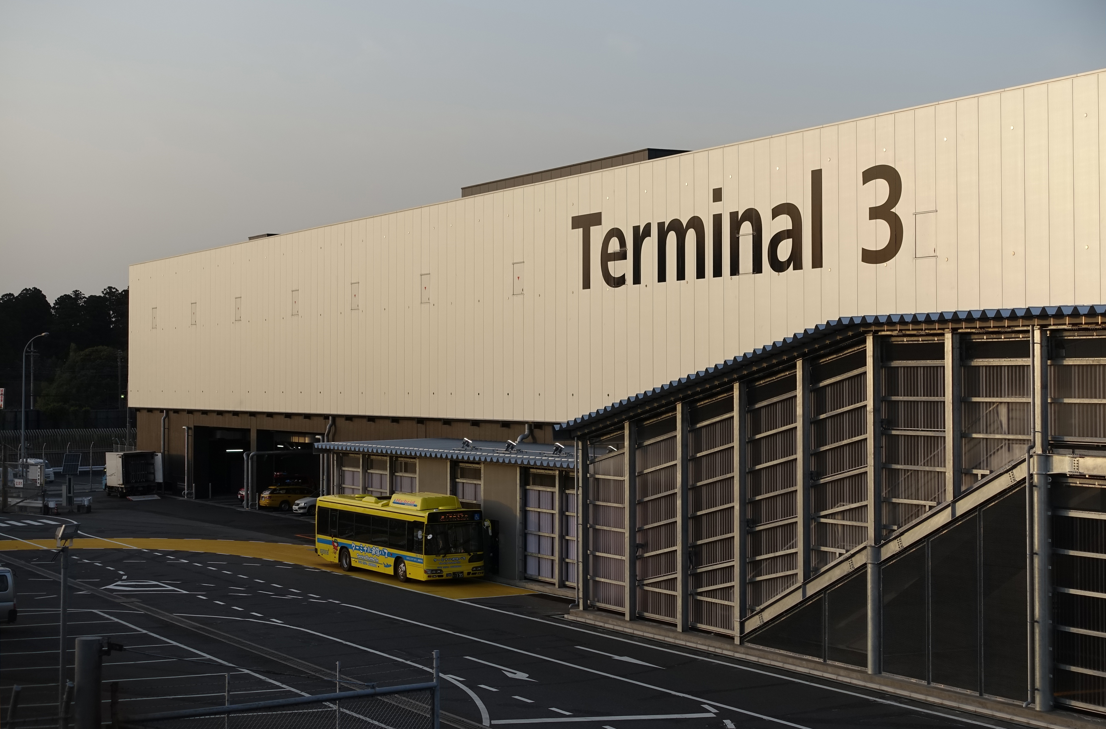 成田国際空港第3ターミナル近影および巡回バス乗り場